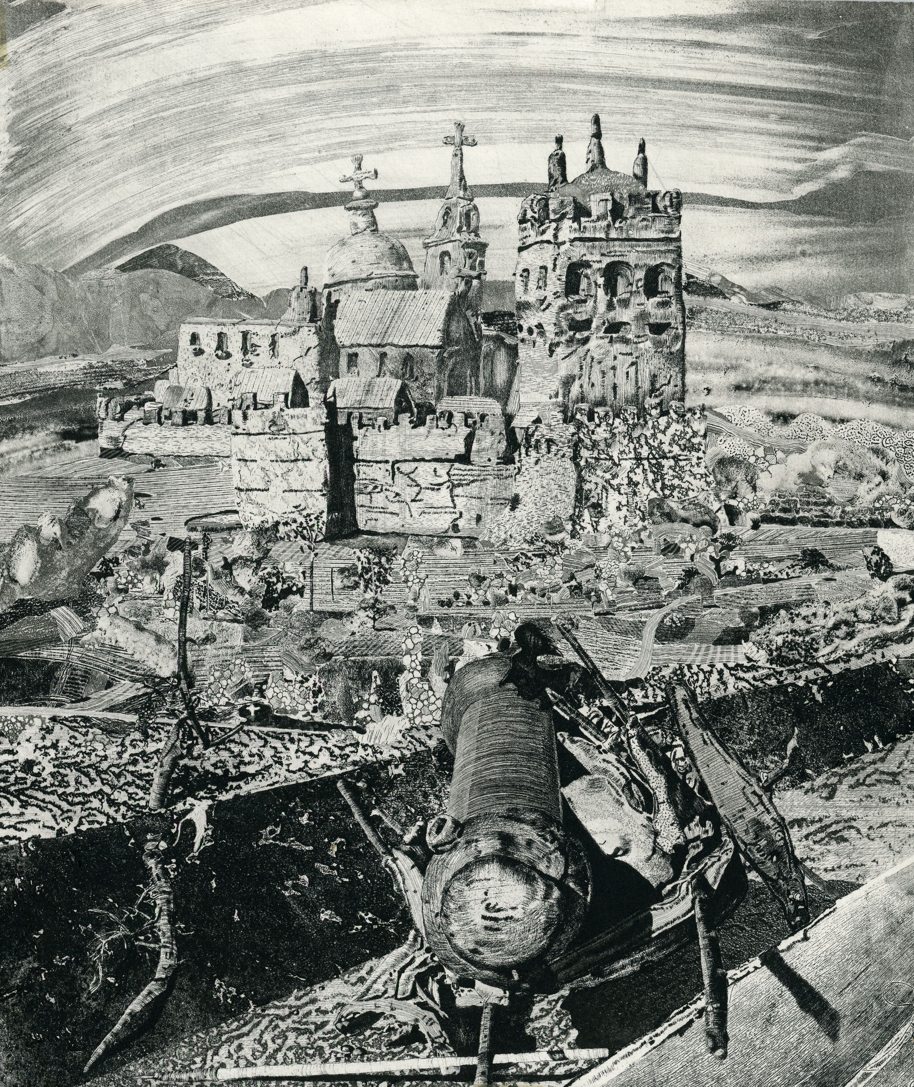 La battaglia di Cerignola del 28 aprile 1503.acquaforte, acquatinta e vernice molle, mm.308x262 Toni Pecoraro, invenit et fecit 1998.